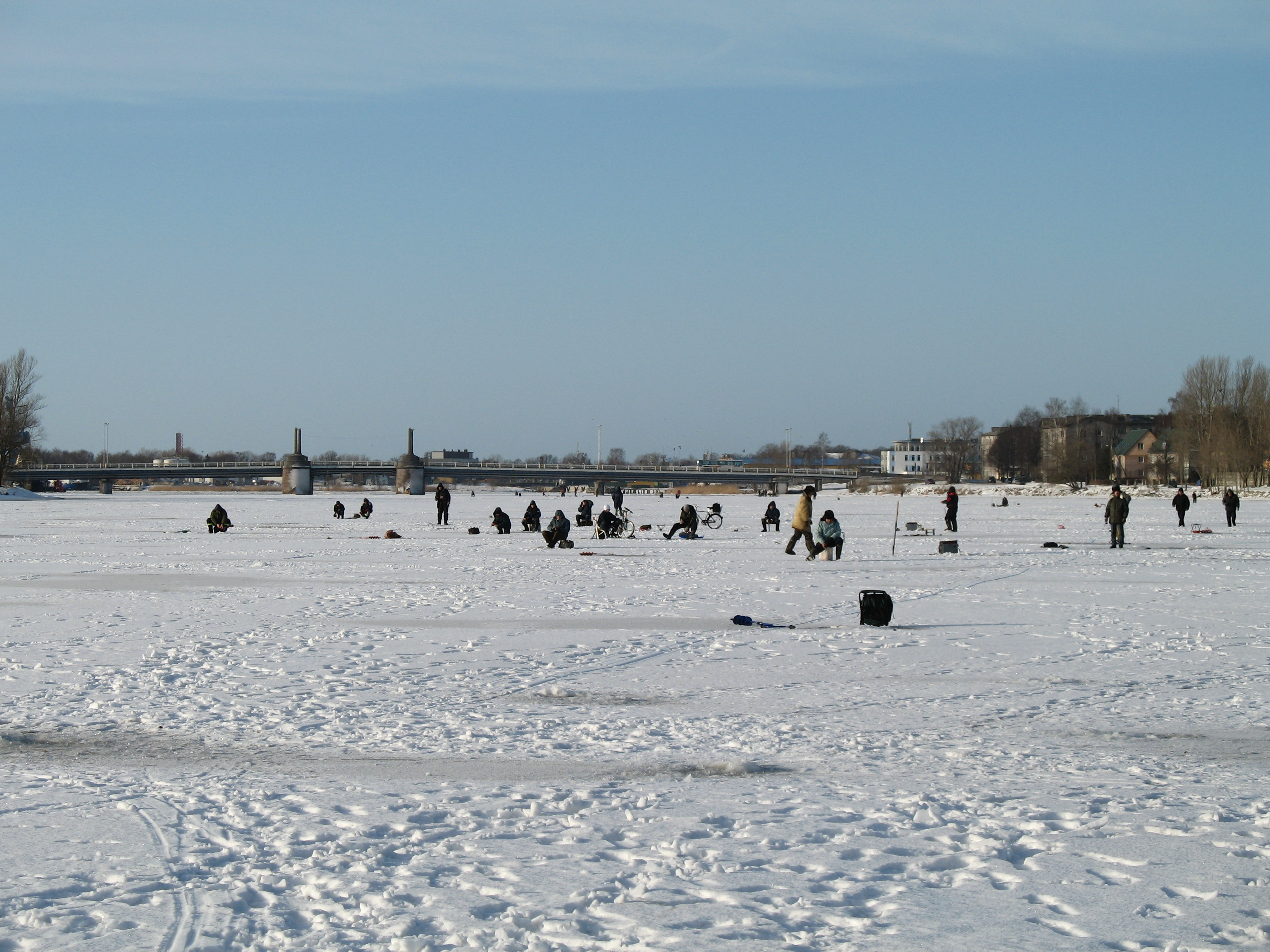 Pärnu jõgi talvel